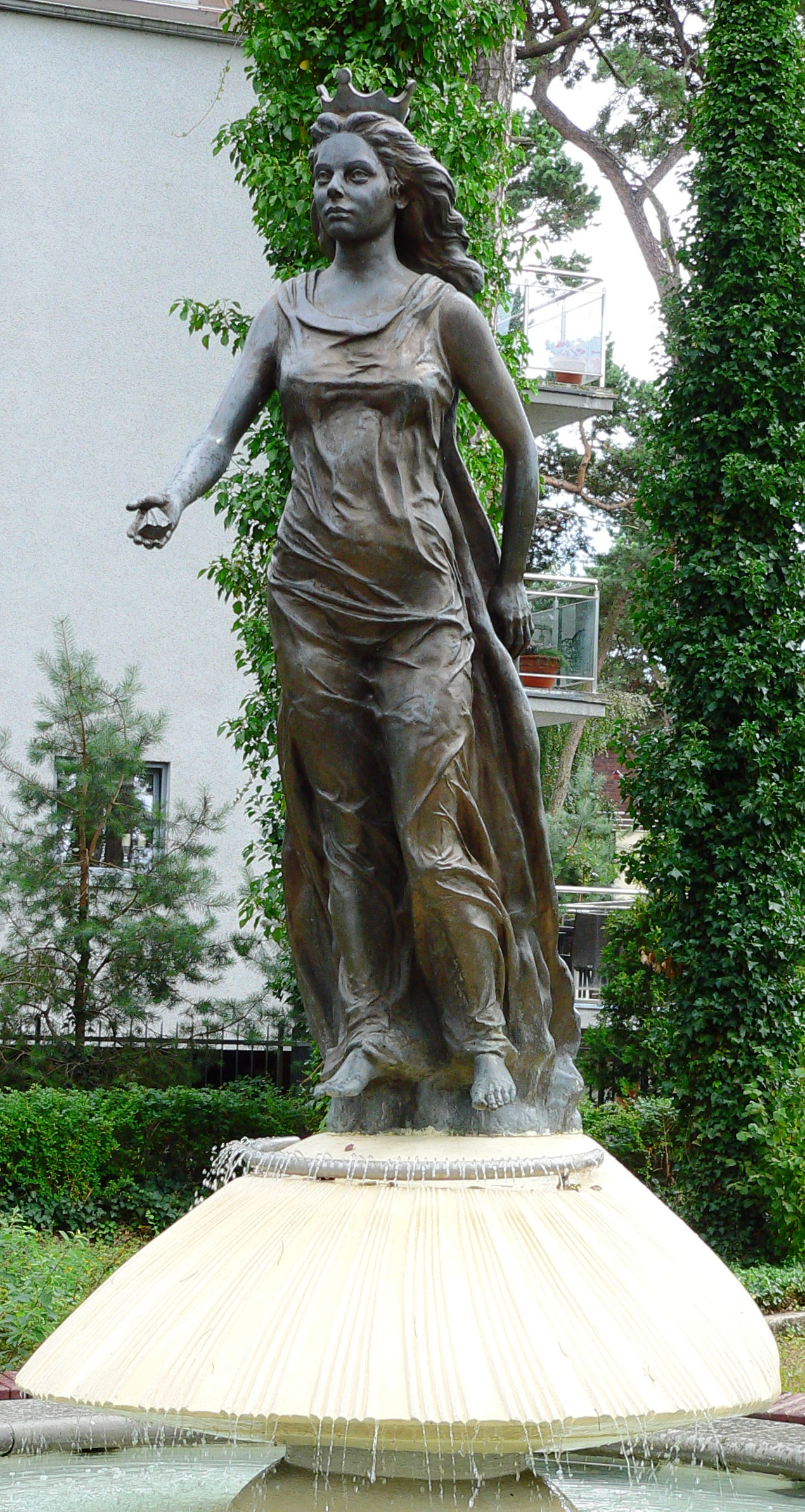 Figura bogini Juraty w miejscowości Jurata (Jastarnia).